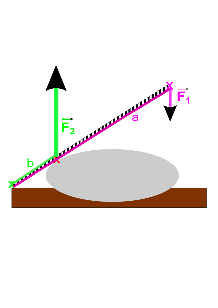 náčrtek